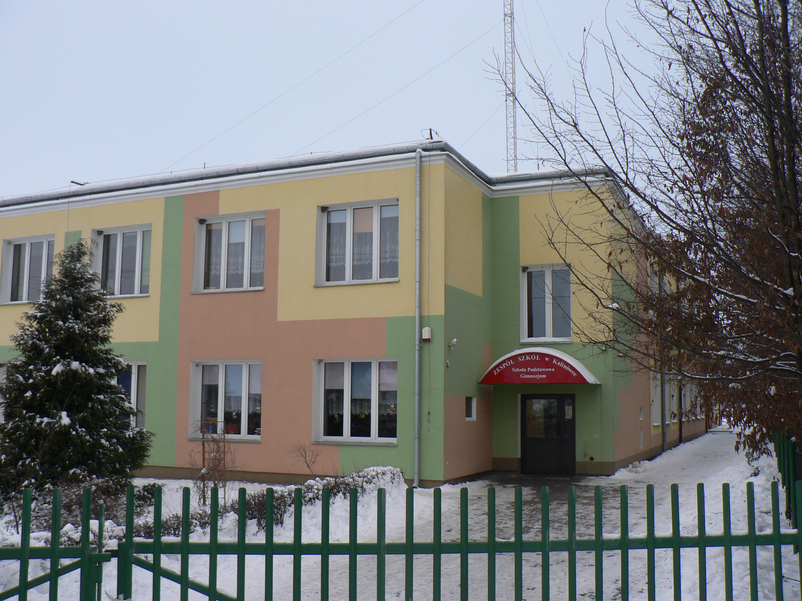 Kalinówka k. Lublina